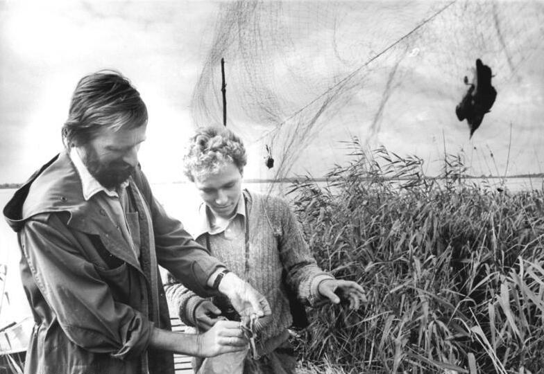 Putzar, Vogelschutzaktion Zum Beitrag: "Pässe" auch für Schilfbewohner- Zur Vogelberingung im Naturschutzgebiet am Putzarer See ADN-ZB Barocha-12.9.1986 Christian Scharnweber, Ornithologe und Naturschutzwart am Putzarer See im Bezirk Neubrandenburg, nimmt behutsam die Vögel aus dem Netz, das für die Durchführung einer Fang- und Beringungsaktion für Schilfbewohner aufgestellt wurde. Alle anderthalb Stunden - bei kühlem Wetter häufiger - werden die Netze kontrolliert. Hier assistiert dem Diplom-Biologen der Oberschüler Stefan Fischer, ein begeisterter Vogelfreund, der nach dem Abitur Biologie studieren möchte und in den Ferien in Putzar seine praktischen ornithologischen Fähigkeiten vervollkommnete. In dem Putzarer Naturschutzgebiet, das hauptsächlich aus See und Schilfgürtel besteht, hat Christian Scharnweber von der handwerklich-praktischen bis zur wissenschaftlichen Arbeit alles selbst zu erledigen. (Hierzu gehören die Fotos 1986-0912-308N-310N!)